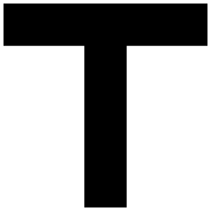 Cruz de San Antonio Abad